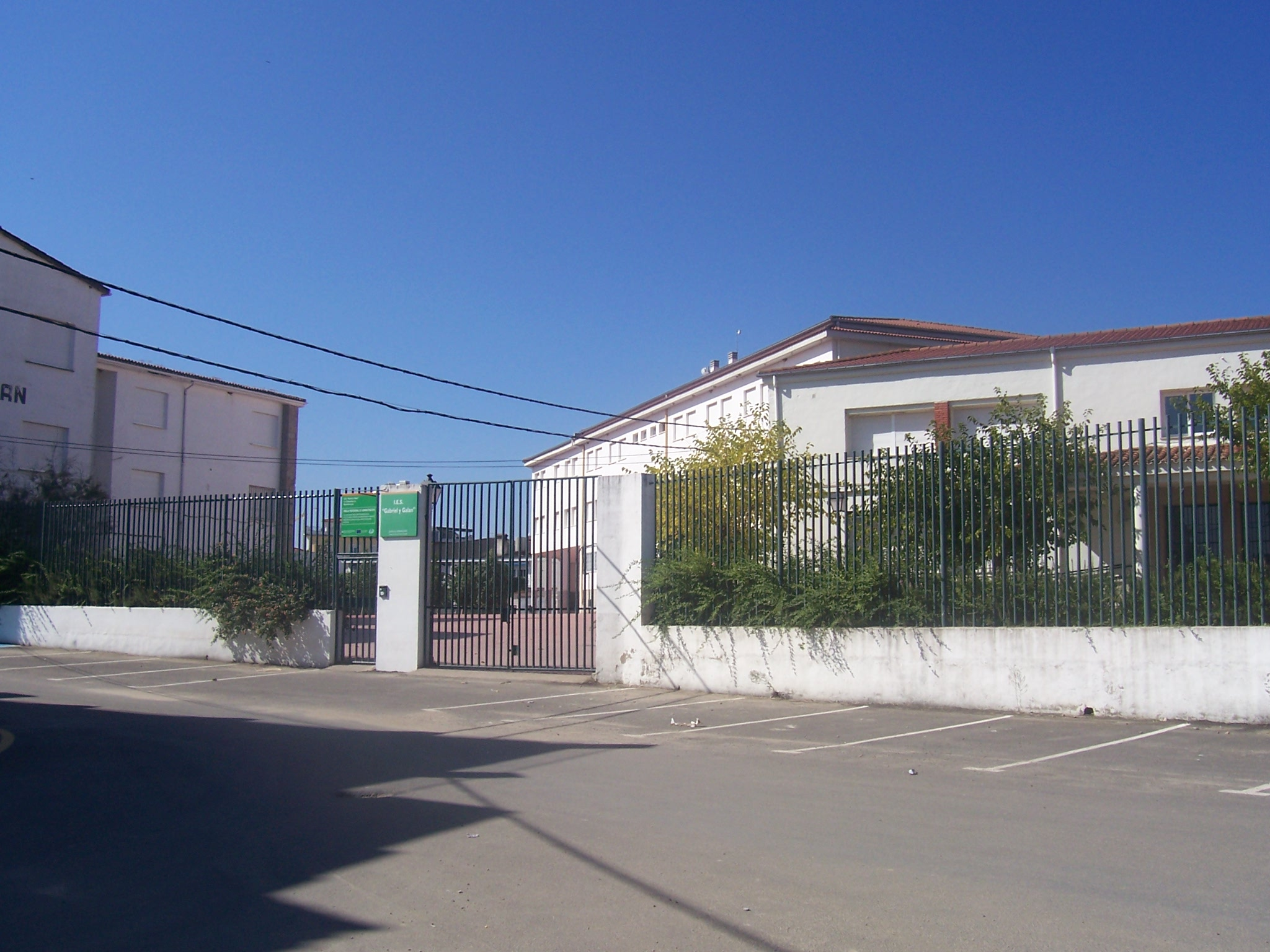 Instituto de Educación Secundaria Gabriel y Galán, en Montehermoso, Cáceres, España (2007)